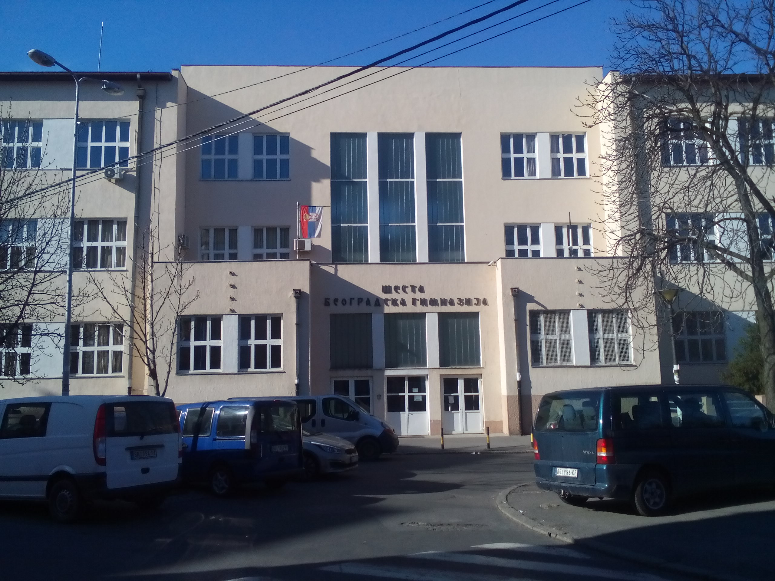 Pročelje Šeste beogradske gimnazije